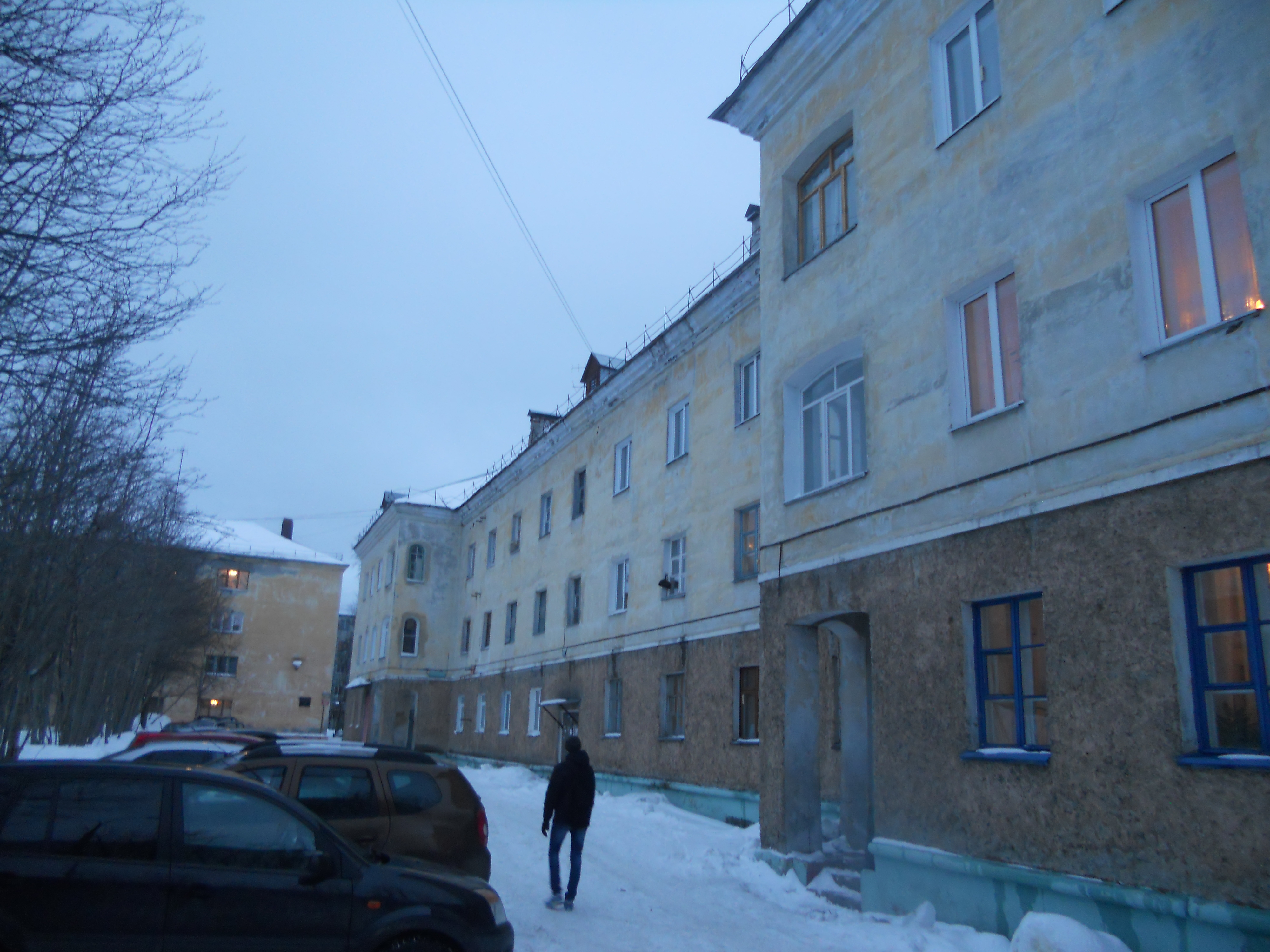 Фестивальная д 5